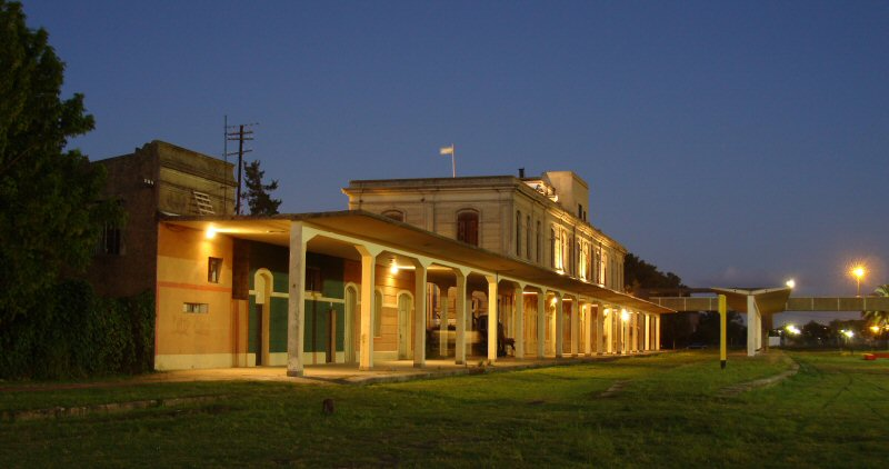 Estación La Plata del ex FCPBA